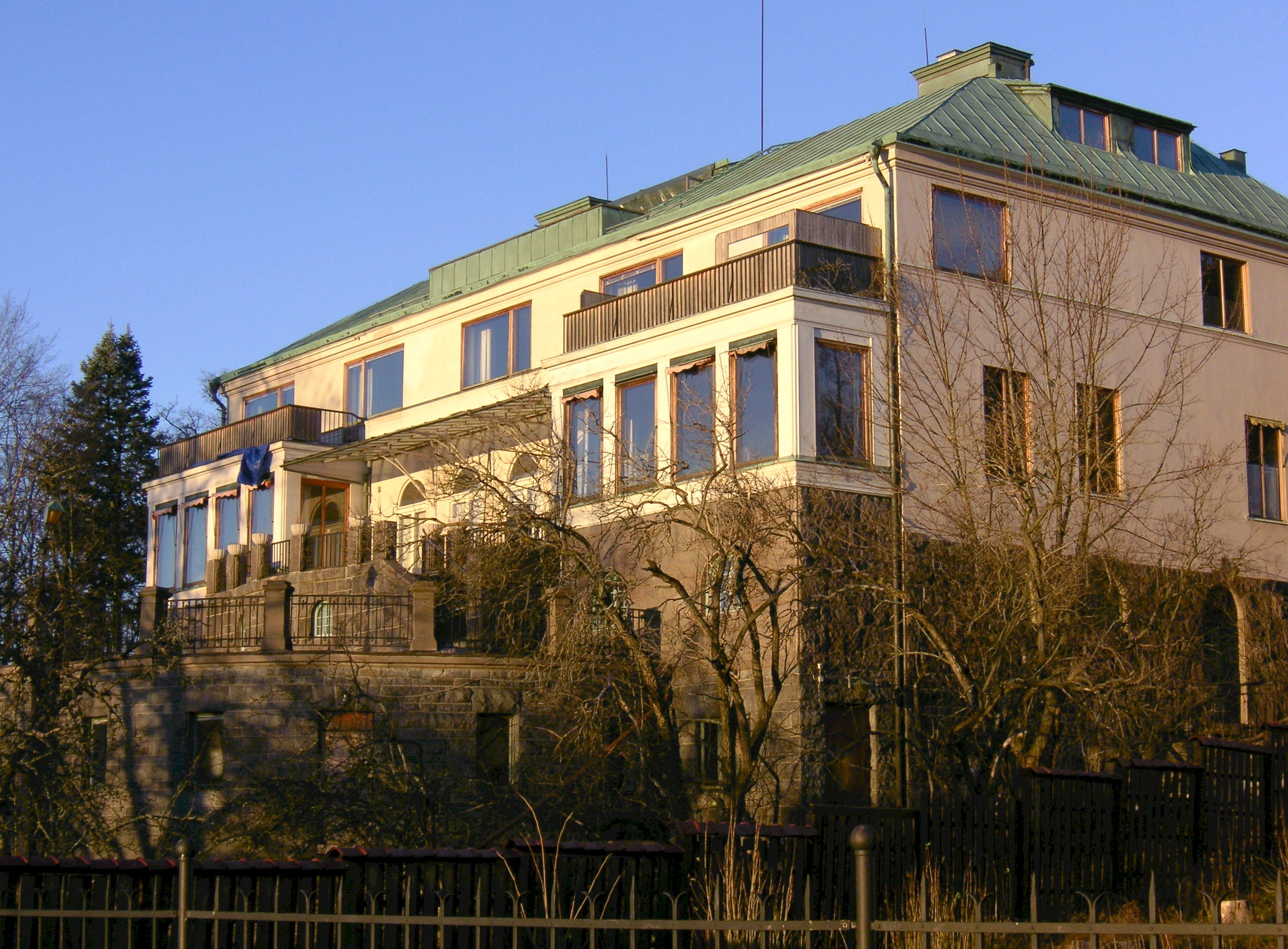 "Villa Ekudden" Blockhusudden, Södra Djurgården, Stockholm (Kreuger-familjens Villa Ekudden på Djurgården.)